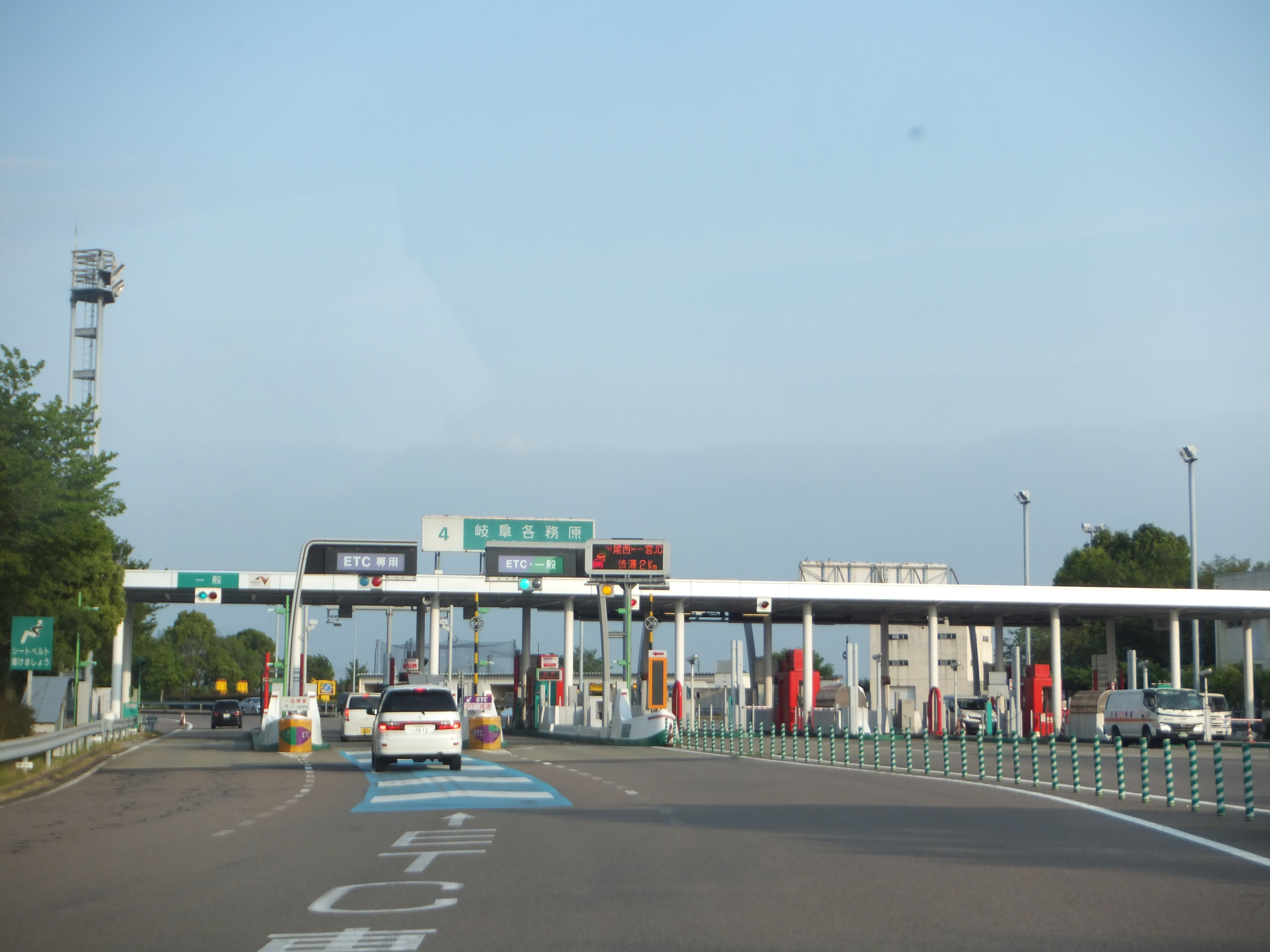 東海北陸自動車道。岐阜各務原インターチェンジ。